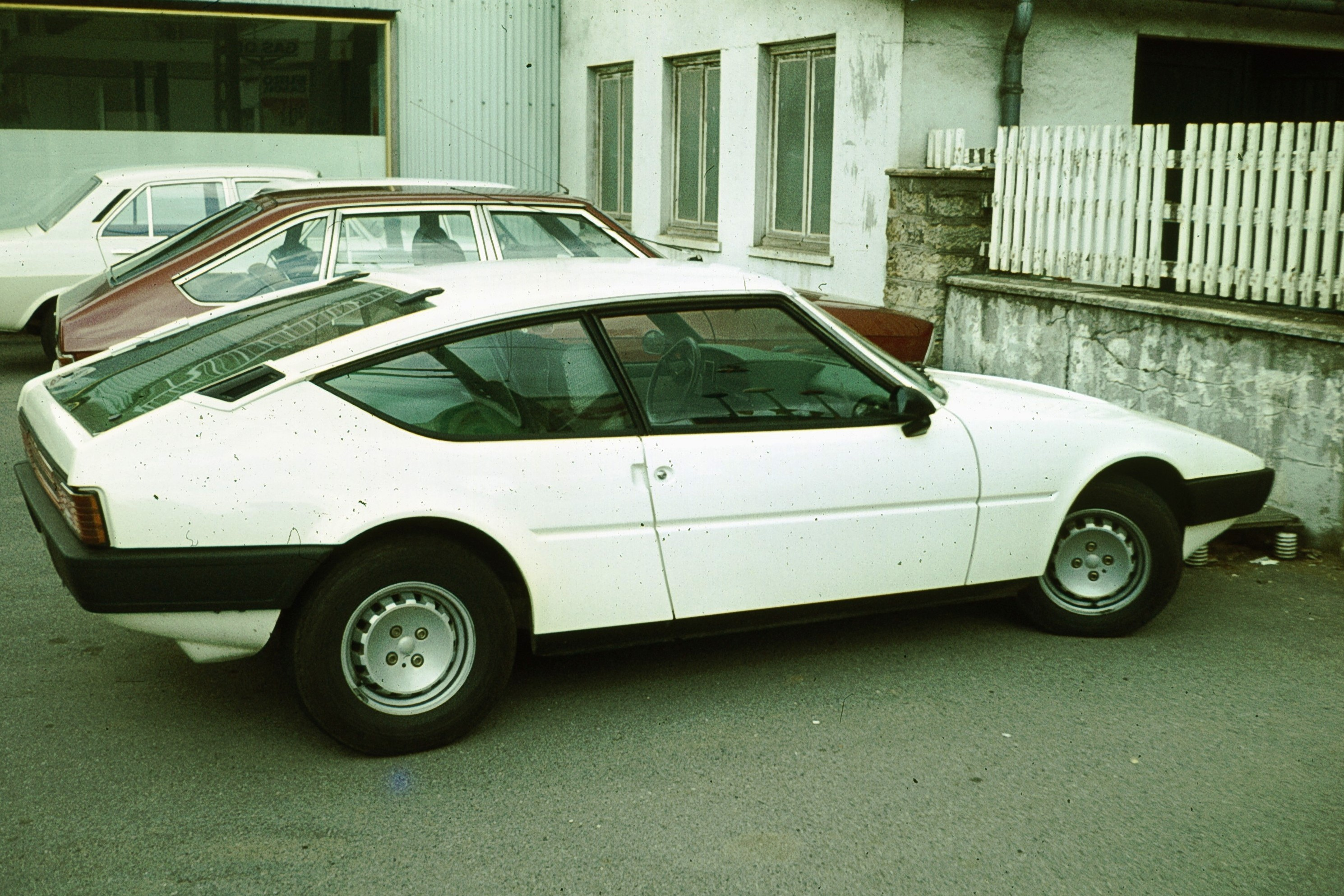 Matra-Simca Bagheera (model after 1976)